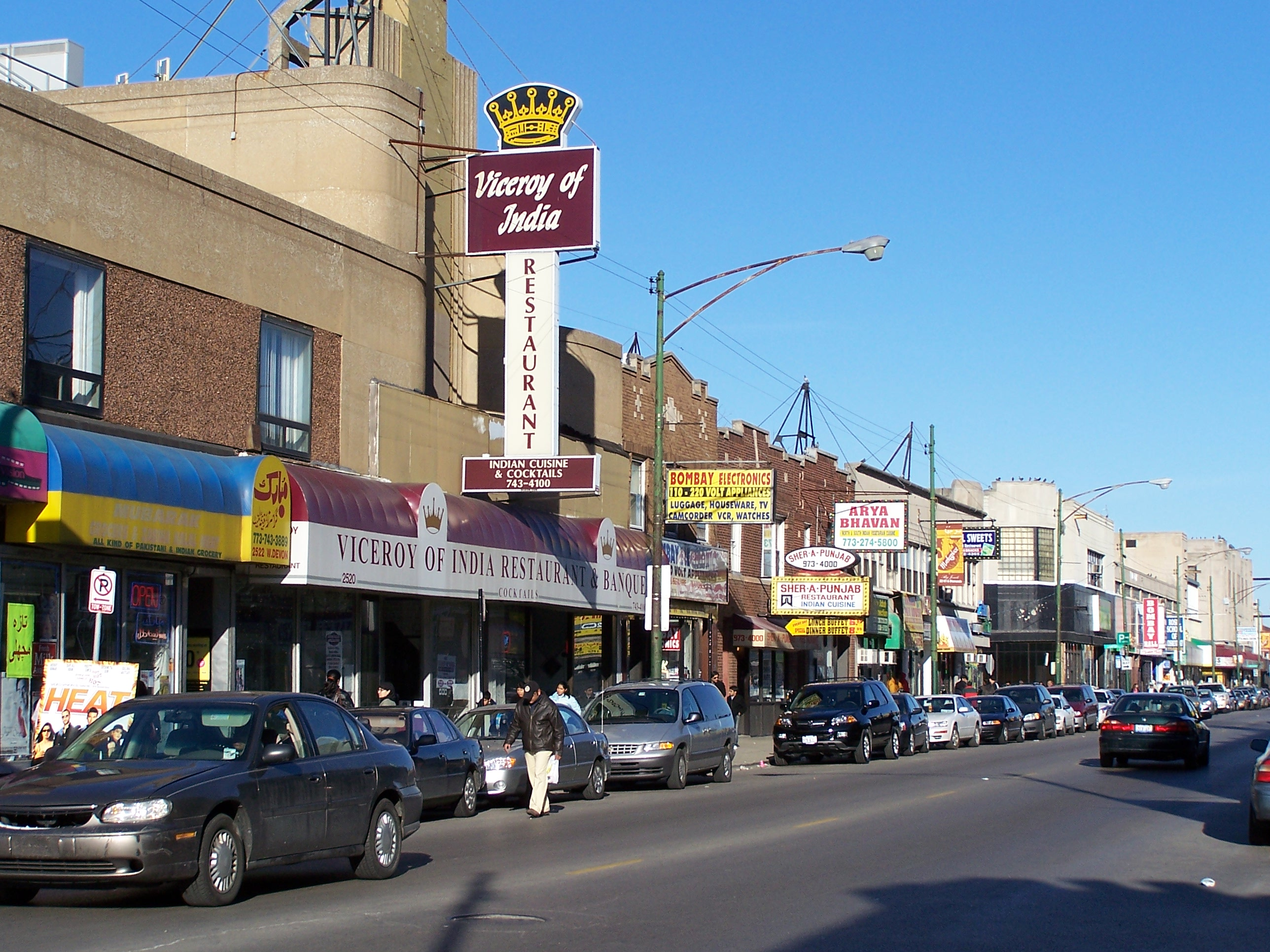 Devon Street